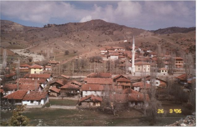 Yapraklı ilçesi Çakırlar köyü , köy cami etrafı Resim Latif Yampal'a aittir.